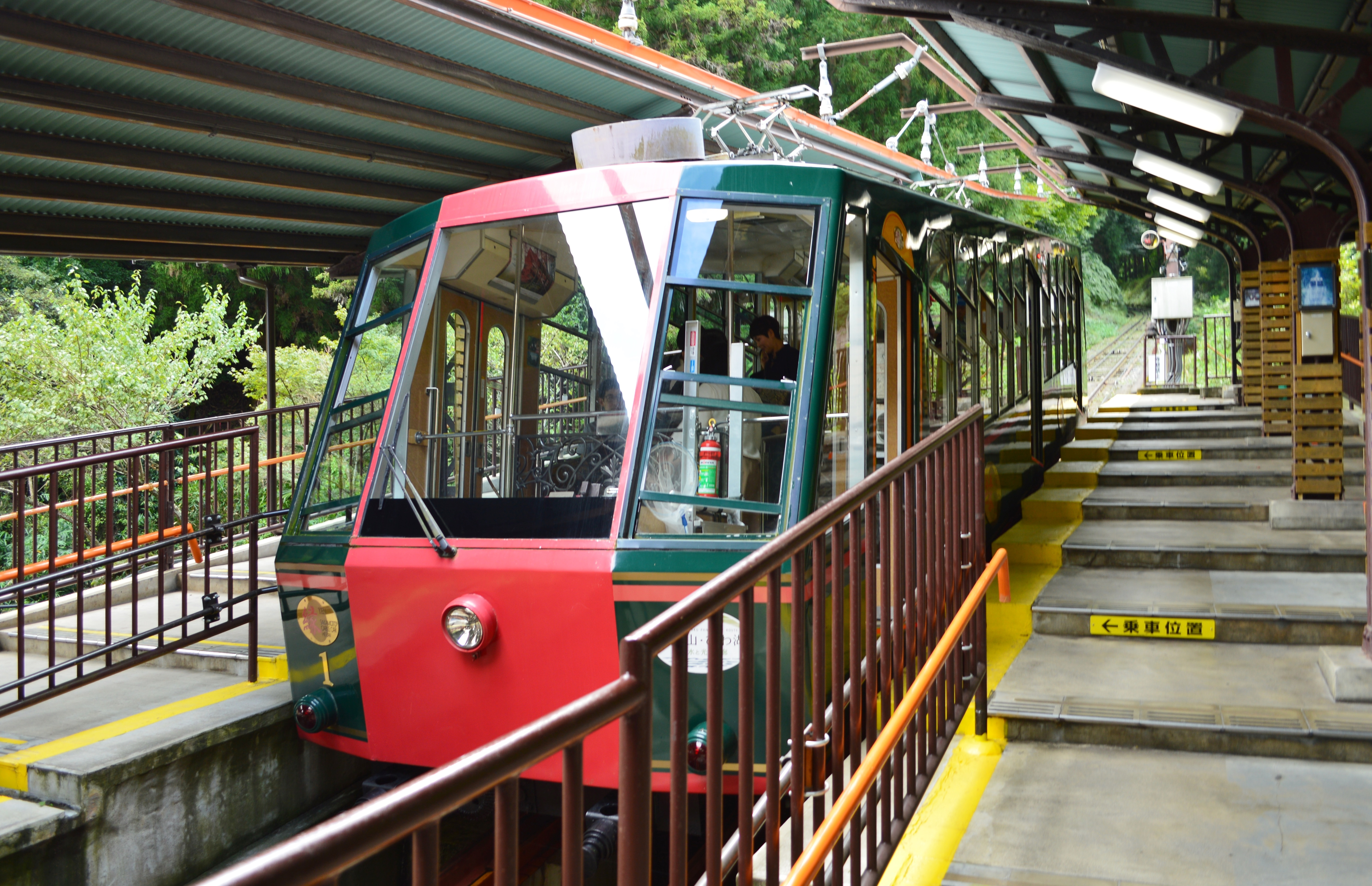 比叡山鉄道ケーブルカー (ケーブル坂本駅にて)